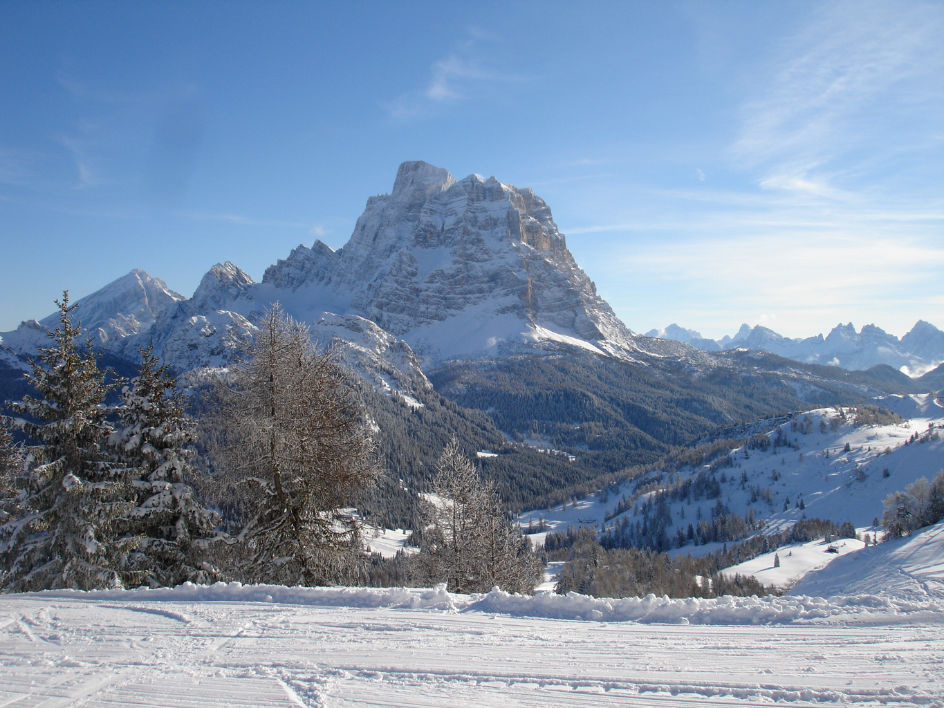 Monte Pelmo visto dal Civetta